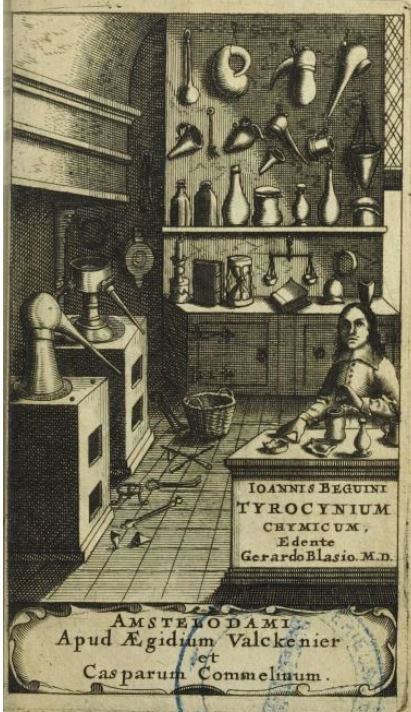 Représentation d'un laboratoire de chimie au XVIIs siècle. Frontispice du Tyrocynium chymicum de Jean Beguin, édition de 1659